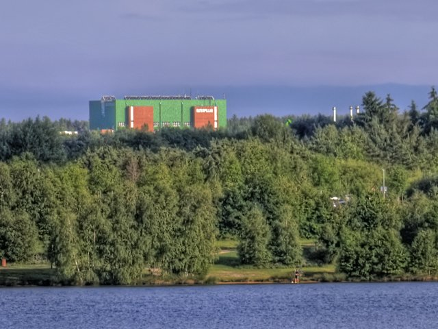 Wiederaufarbeitungsanlage Wackersdorf – Eingangslager über dem Murner See